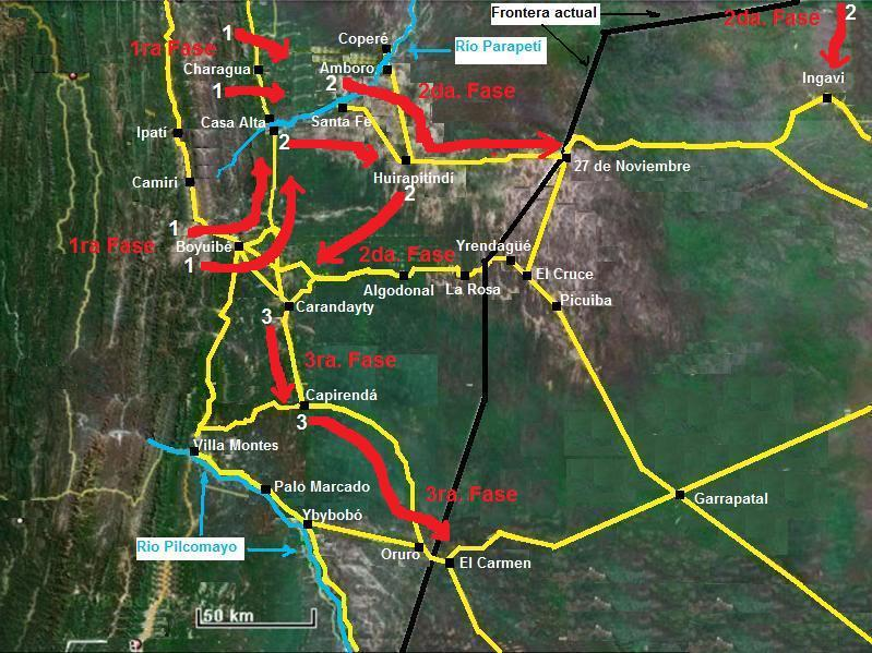 Fases del plan ofensivo boliviano abril 1935